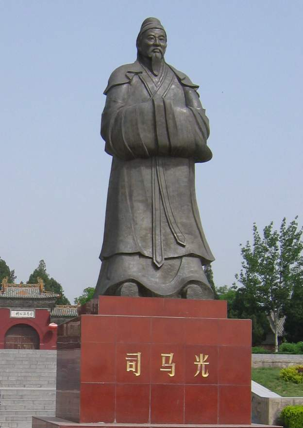 司马温侯祠前的司马光像